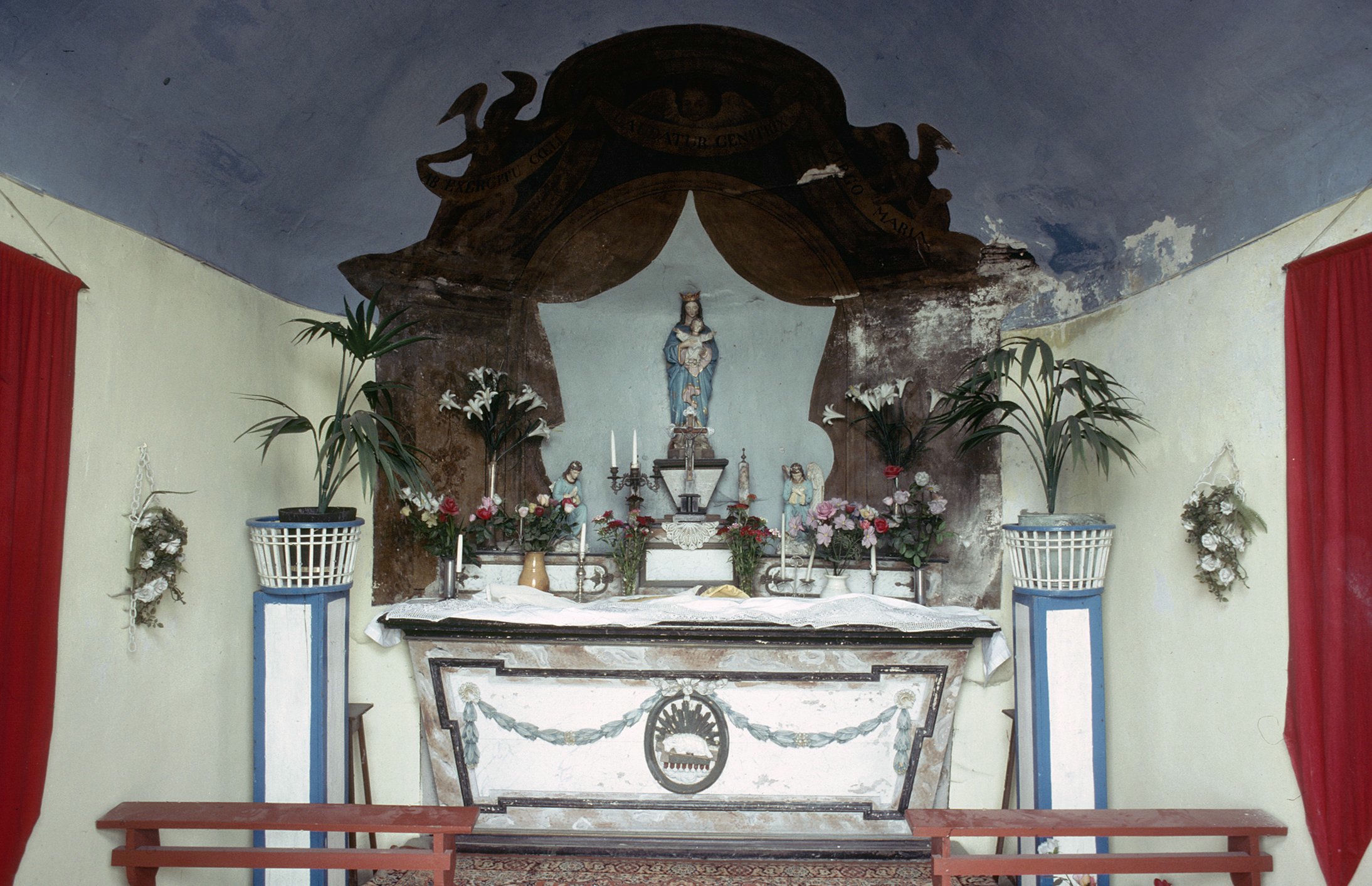 Maastricht, Itteren, interieur Rooms-katholieke Mariakapel met laat-barok altaar ontworpen door Mathias Soiron voor de parochiekerk van Itteren.